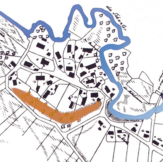 Walle (Schwülper) mit blau eingefärbter Schunter und braun eingefärbtem Wall der Scheverlingenburg